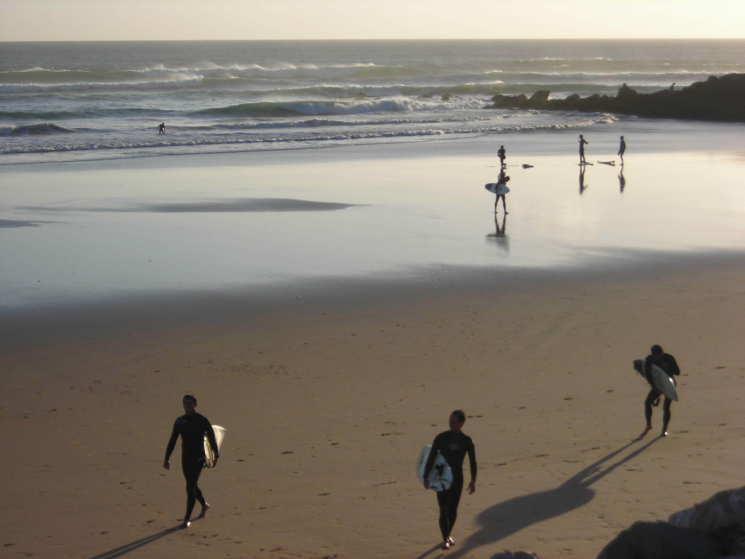 Costa da Caparica